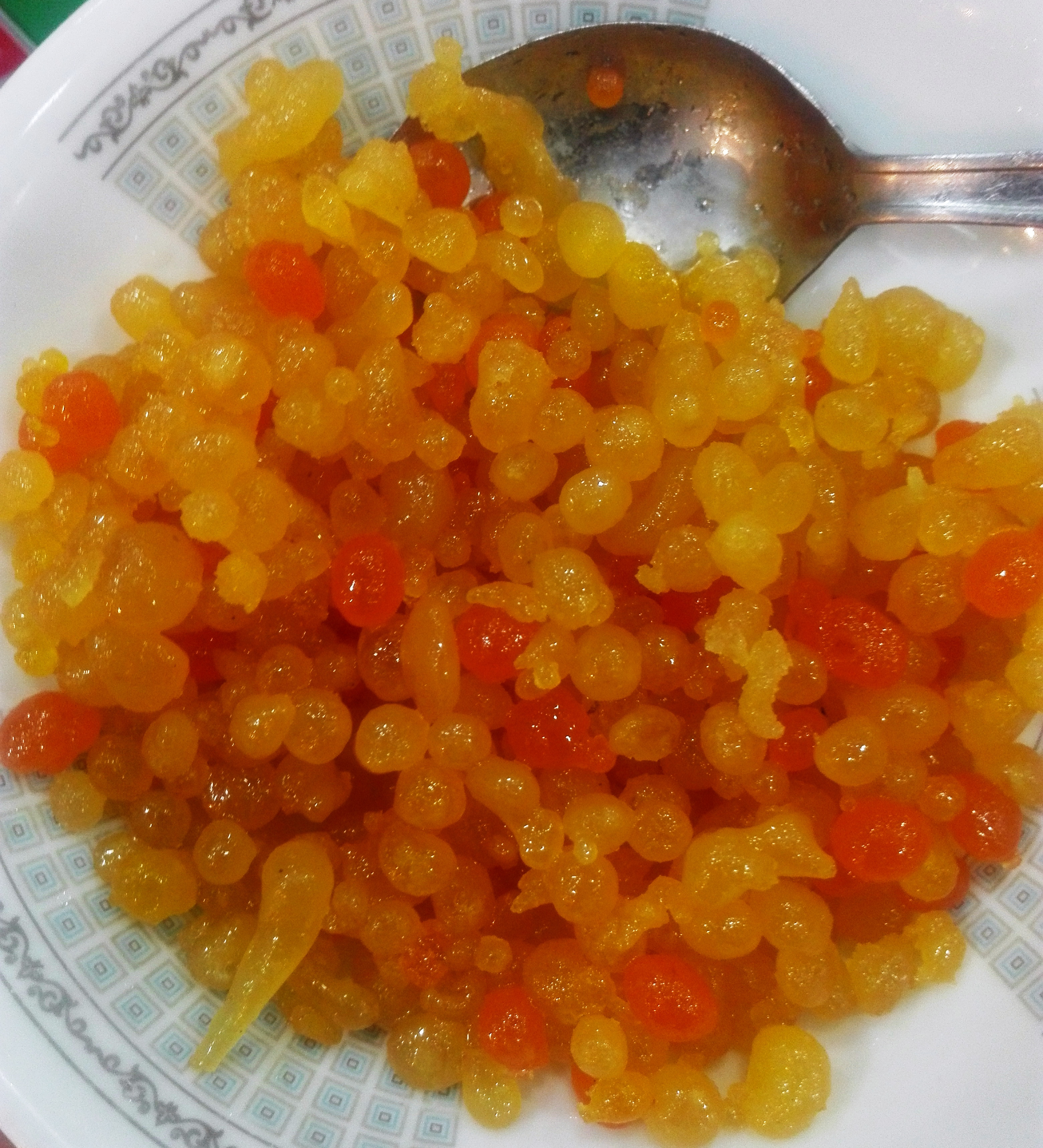 Bundiya also known as mihidana, burinda